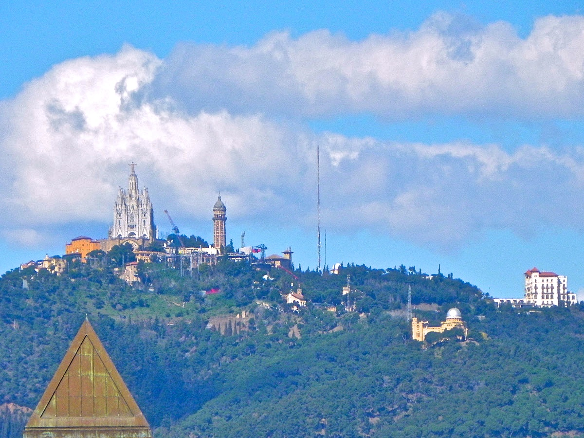 El Tibidabo, l'observatori Fabra i la punxa d'una torre veneciana de Montjuïc en primer pla